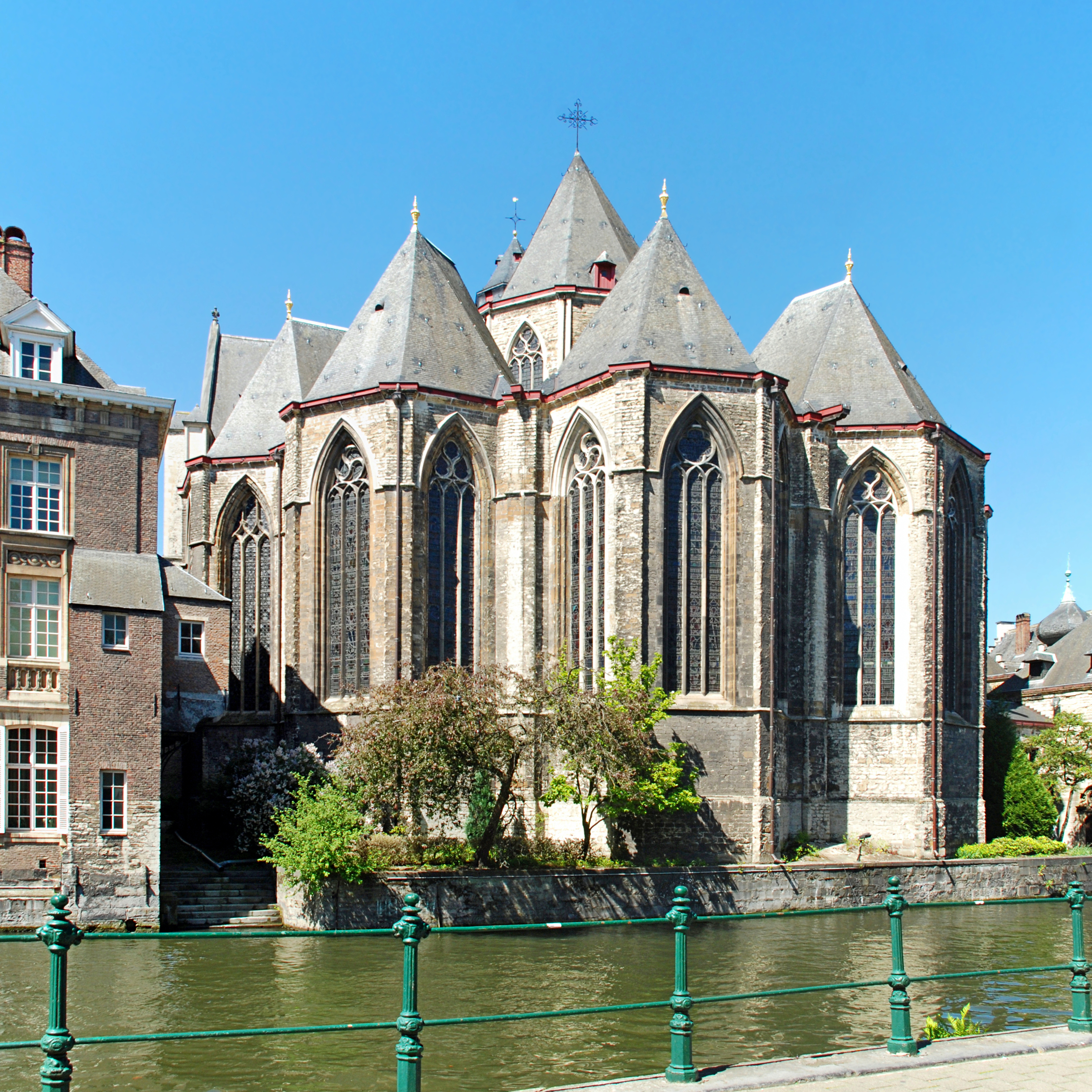 Belgique - Gand - église Saint-Michel - chevet This photo of immovable heritage has been taken in the Flemish Region